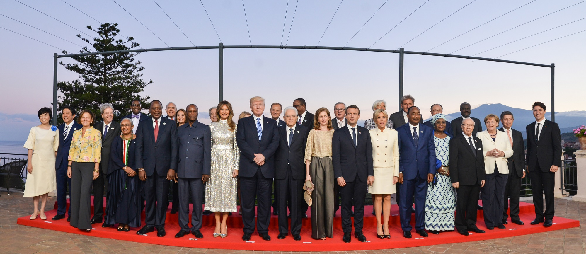 Photo de groupe avec les chefs d'État et leurs conjoints des pays membres du G7.